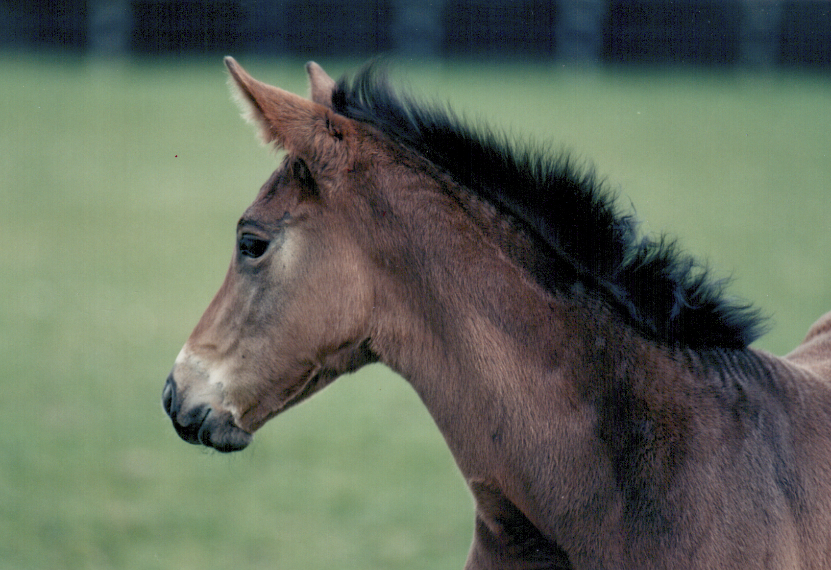 Son premier printemps